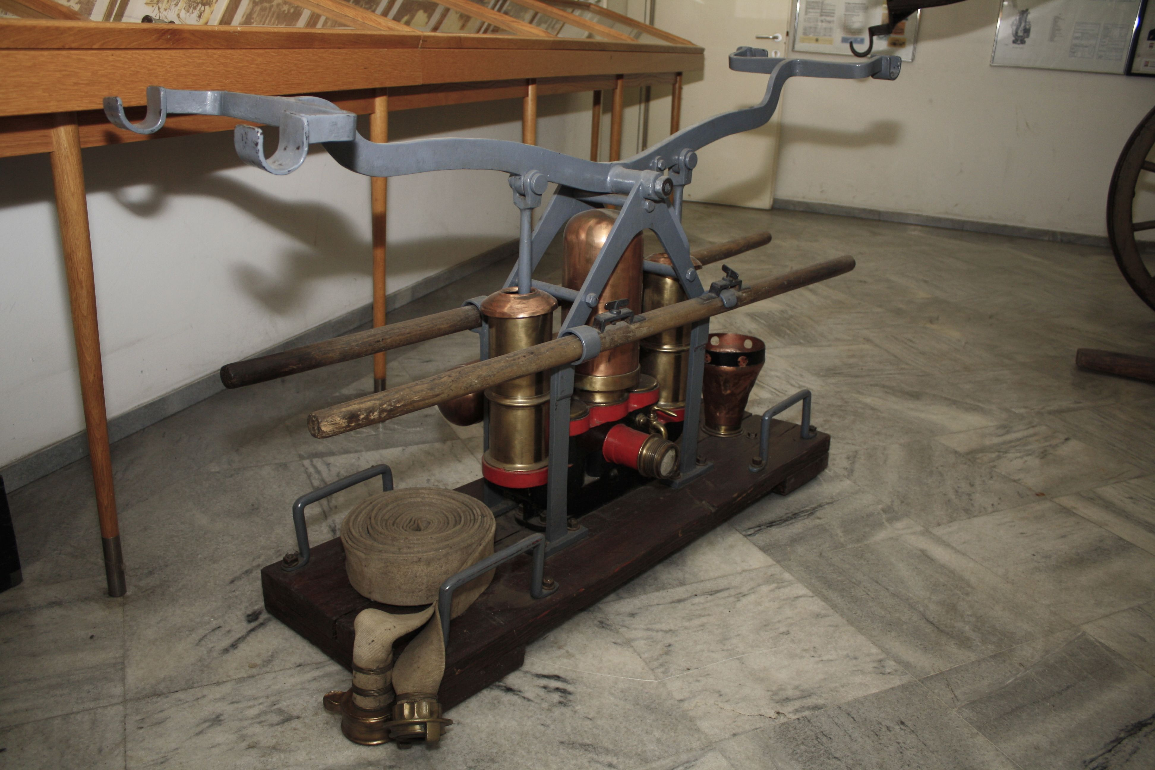 Tragbarer Hydrophor ungefähr aus dem Jahr 1900 im Feuerwehrmuseum Perchtoldsdorf in Niederösterreich